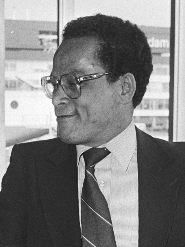 Hans Prade (ambassadeur van Suriname), 2 september 1981